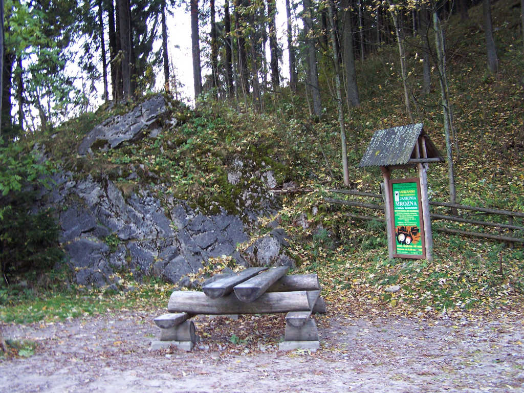 Jarcowy Kamień (Dolina Kościeliska)